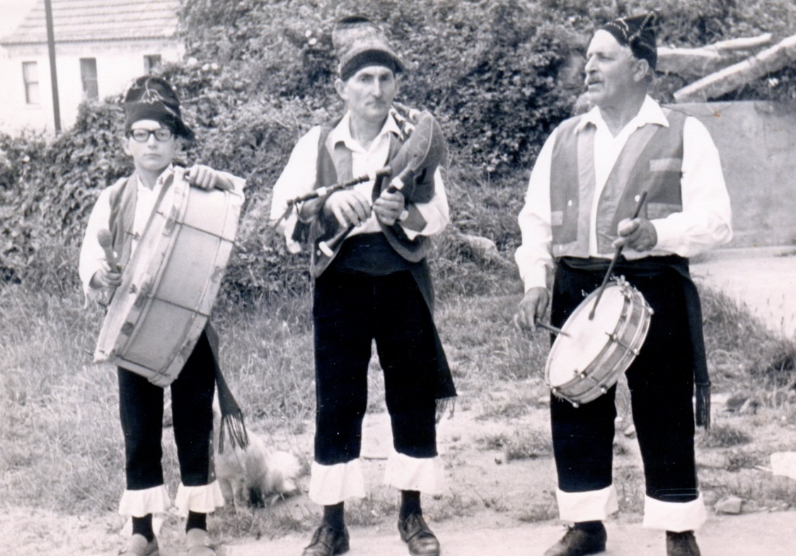 Manuel Barreiro Núñez, máis coñecido como "Budiño", de Moaña, tocando a gaita xunto ao seu fillo Pepe ao bombo.